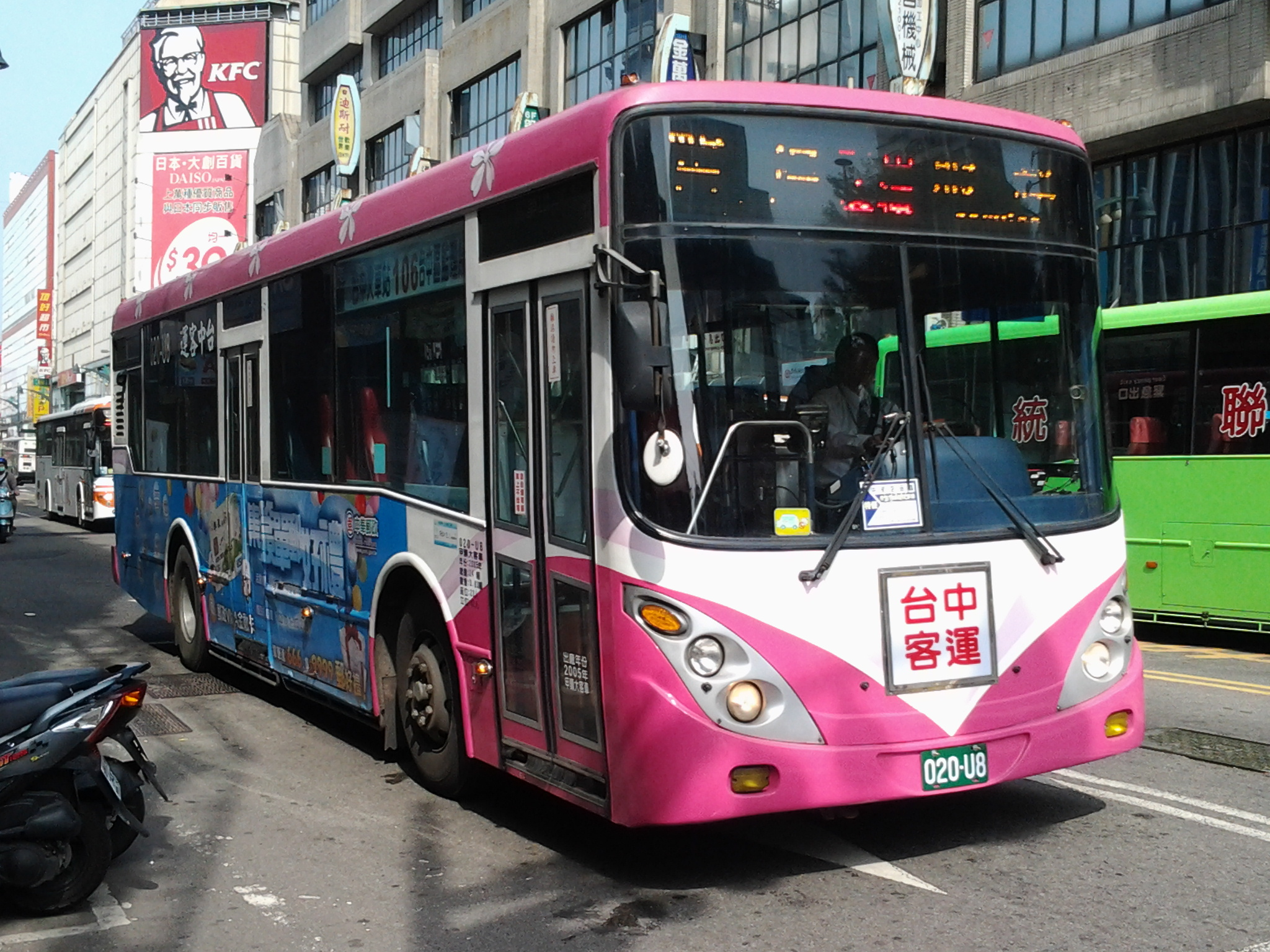 2005〈2013〉 HINO ERK1JML（馨盛）